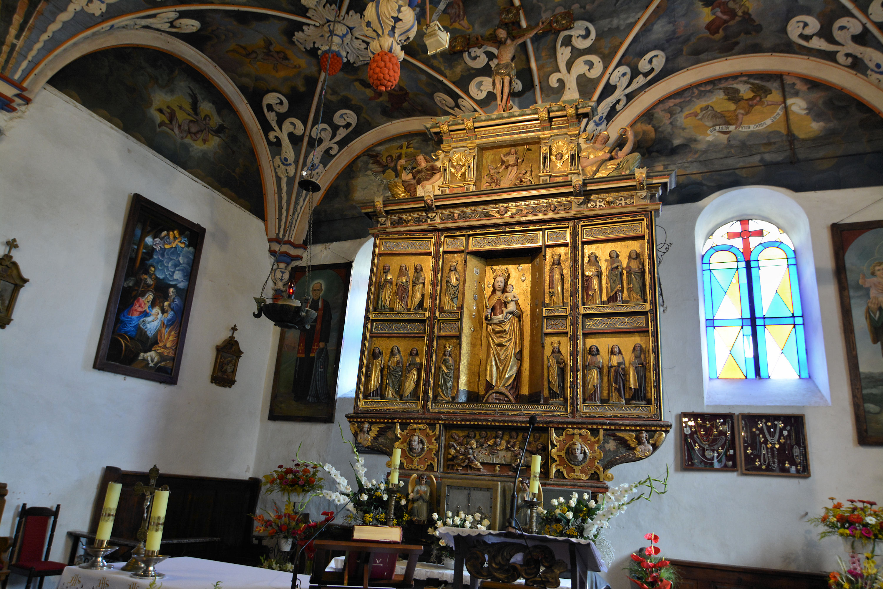 Kościół w Brzesku (koło Pyrzyc)